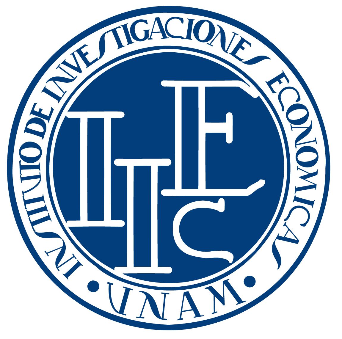 Escudo del Instituto de Investigaciones Económicas de la UNAM